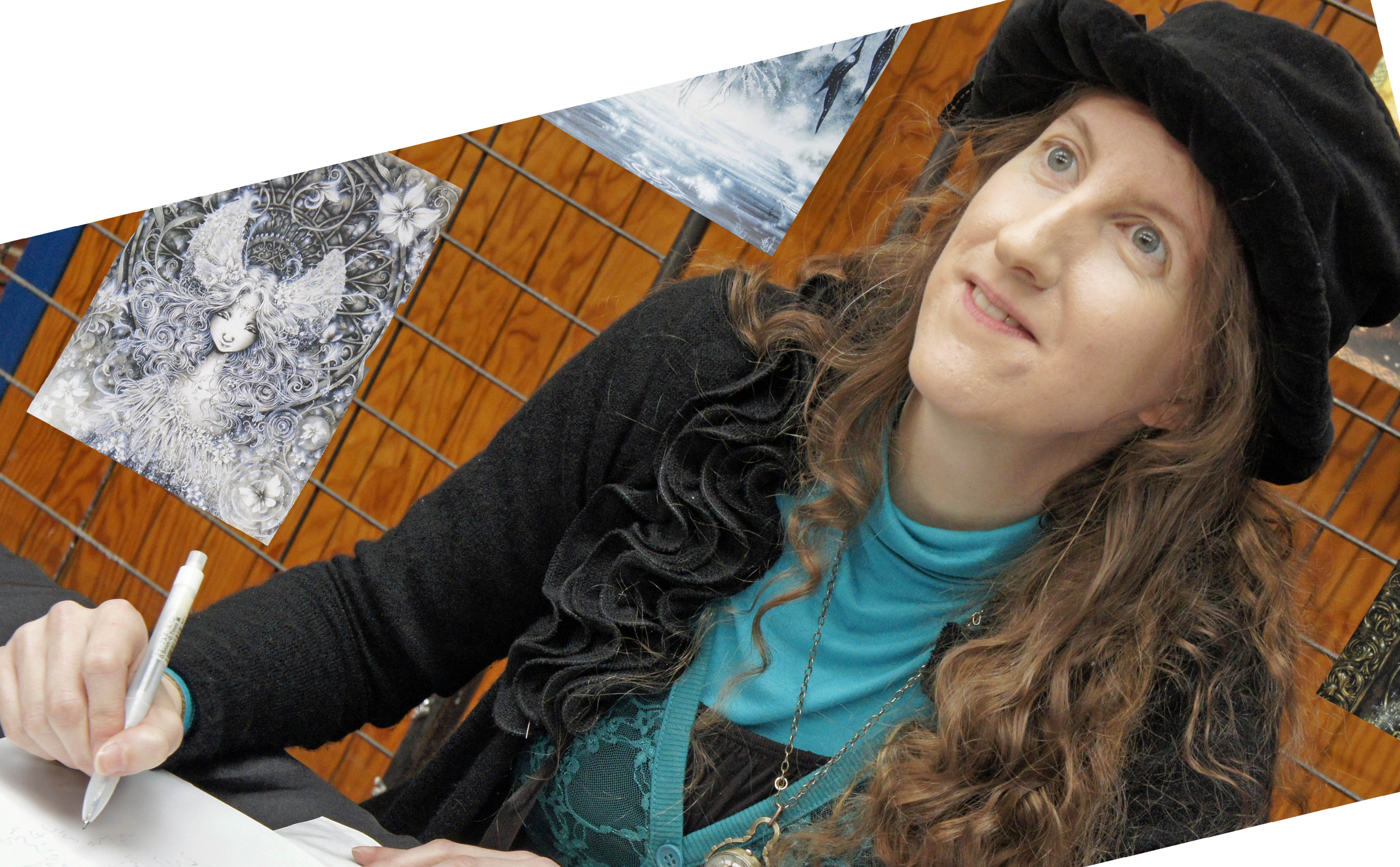 Charline présente lors du Printemps des Légendes.